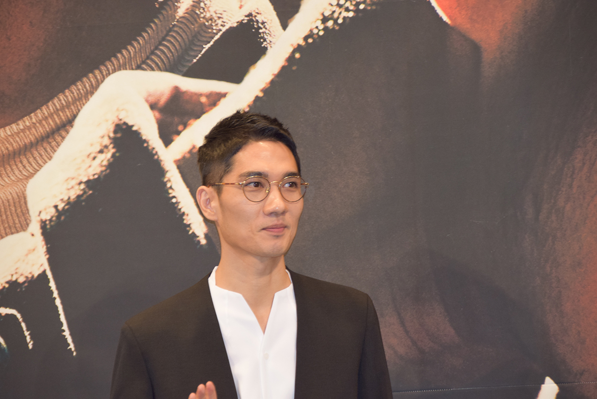 엄태구 OCN오리지널 '구해줘2' 제작발표회 (2019.4.30)